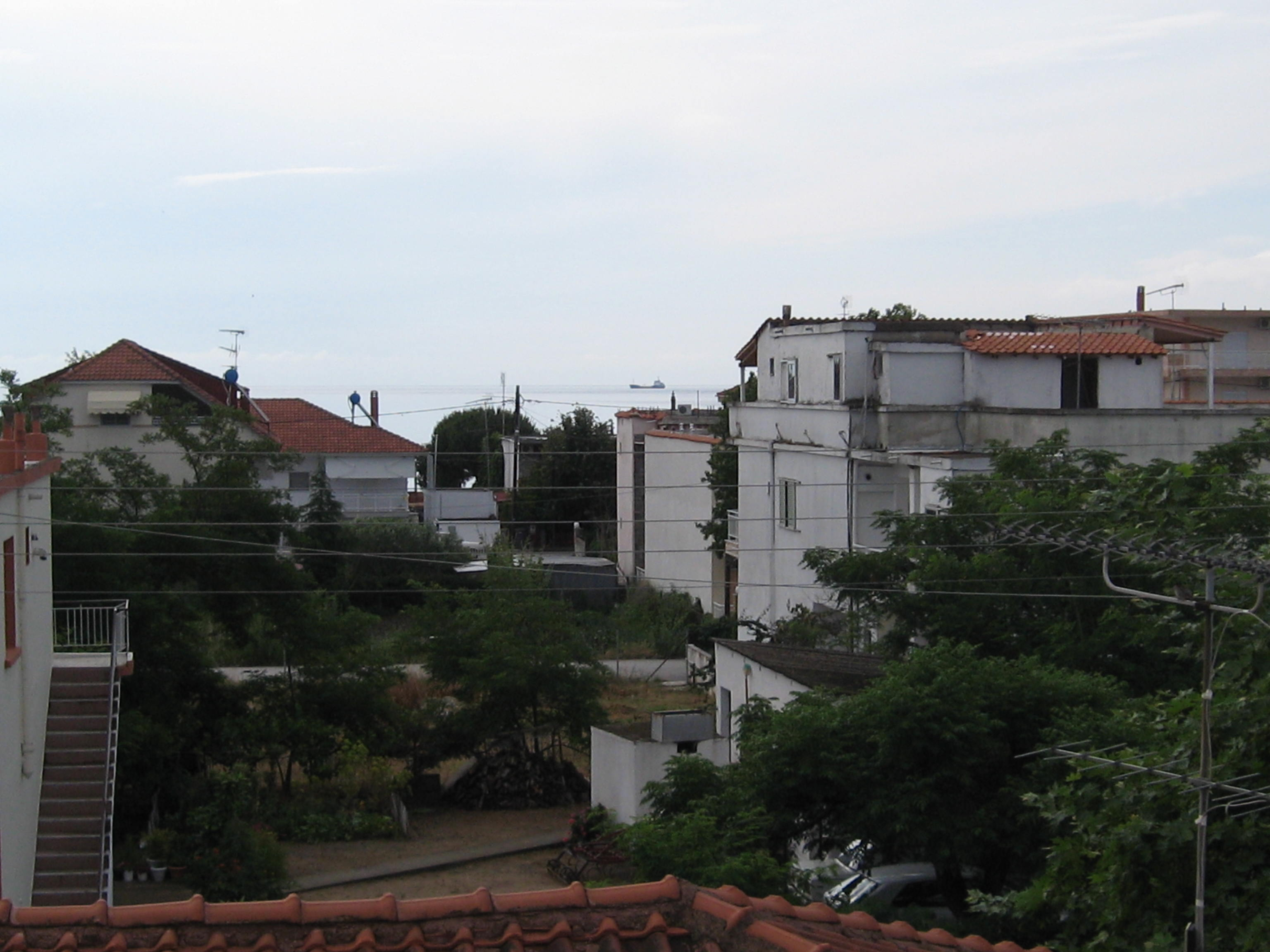 Снимак са једне од тераси Неа Врасна. Драган Цветковић, Ниш.